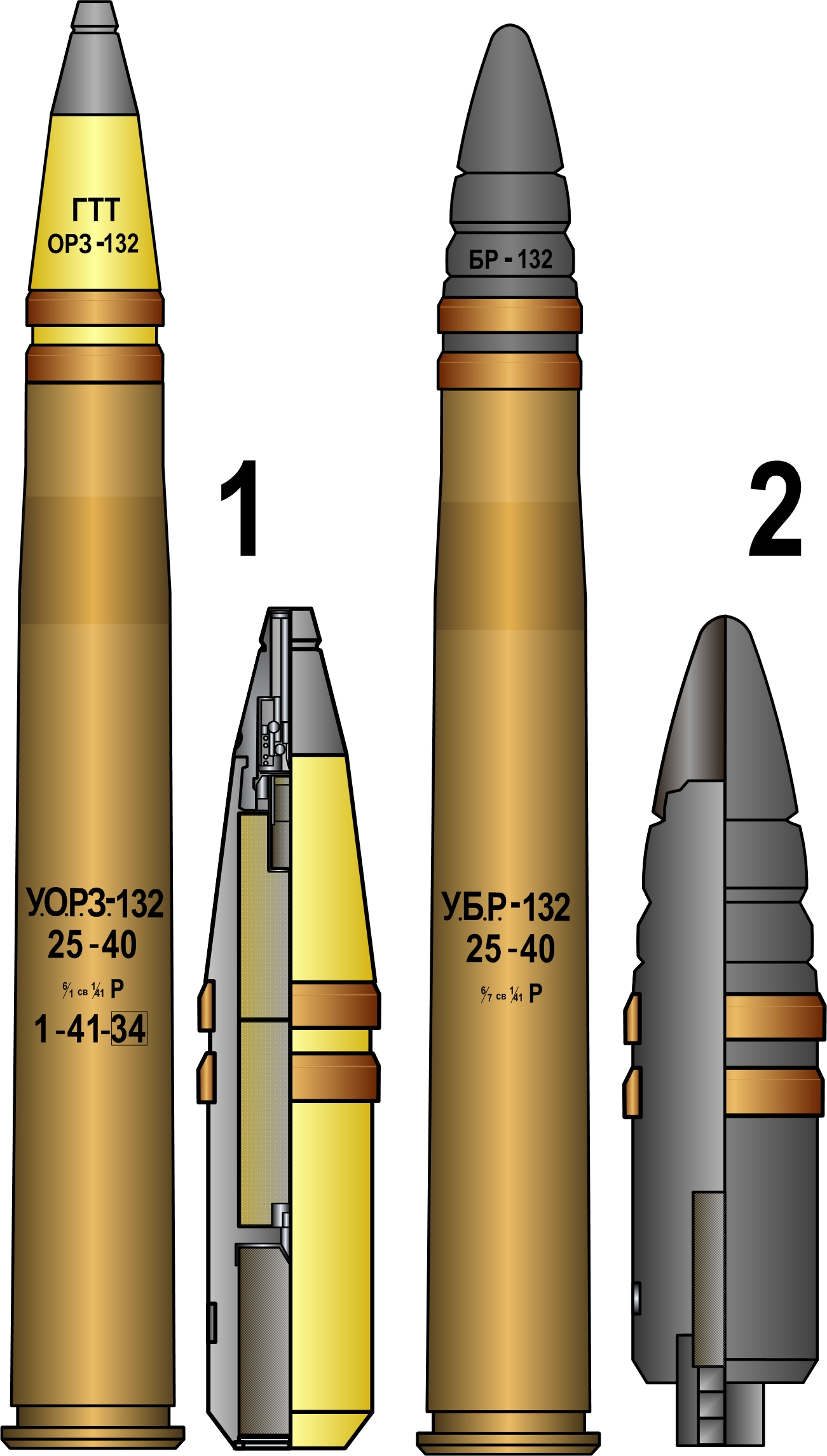 25мм снаряды зенитной пушки 72-К